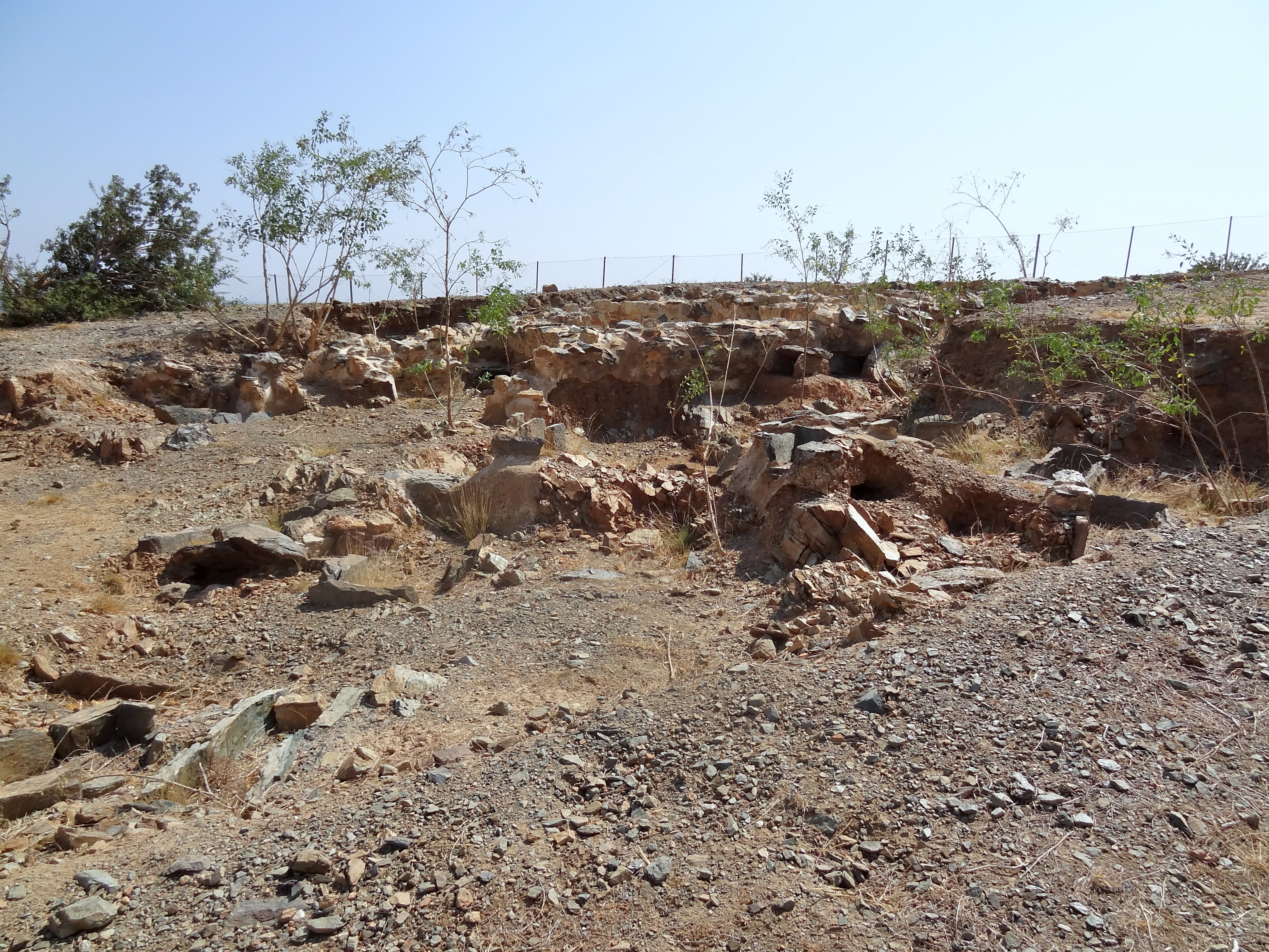 Antike Stätte von Lasaia (Λασαία), Gemeinde Festos, Regionalbezirk Iraklio, Kreta, Griechenland